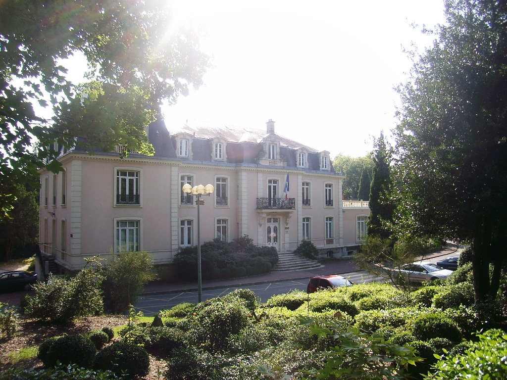 Château de Launay, Orsay